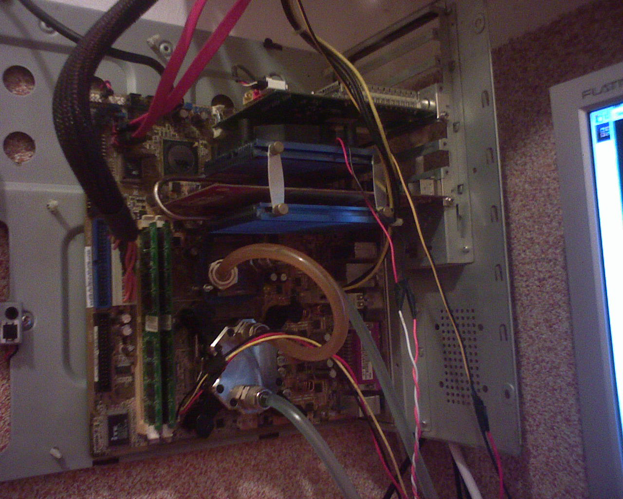 Komputer z chłodzeniem wodnym